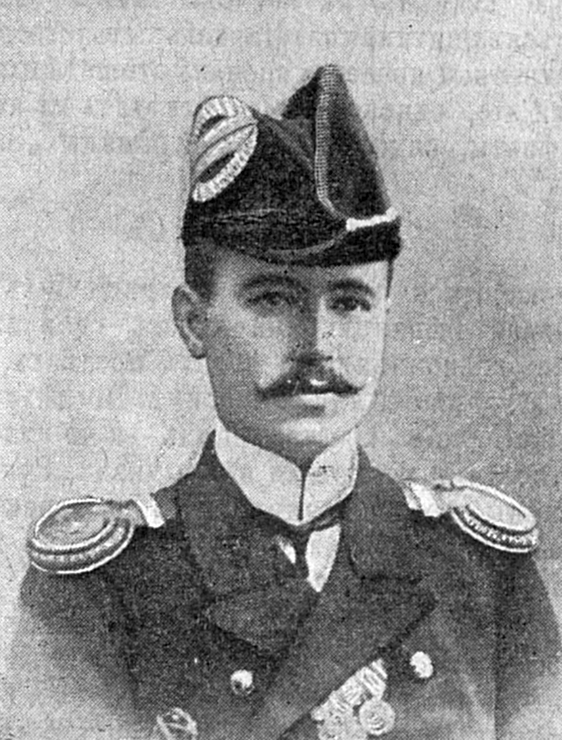 Лейтенант броненосца "Князь Потёмкин Таврический" К.К. Григорков. Покончил жизнь самоубийством 14 июня 1905